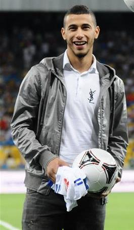 Юнес Белханда — мароконський футболіст